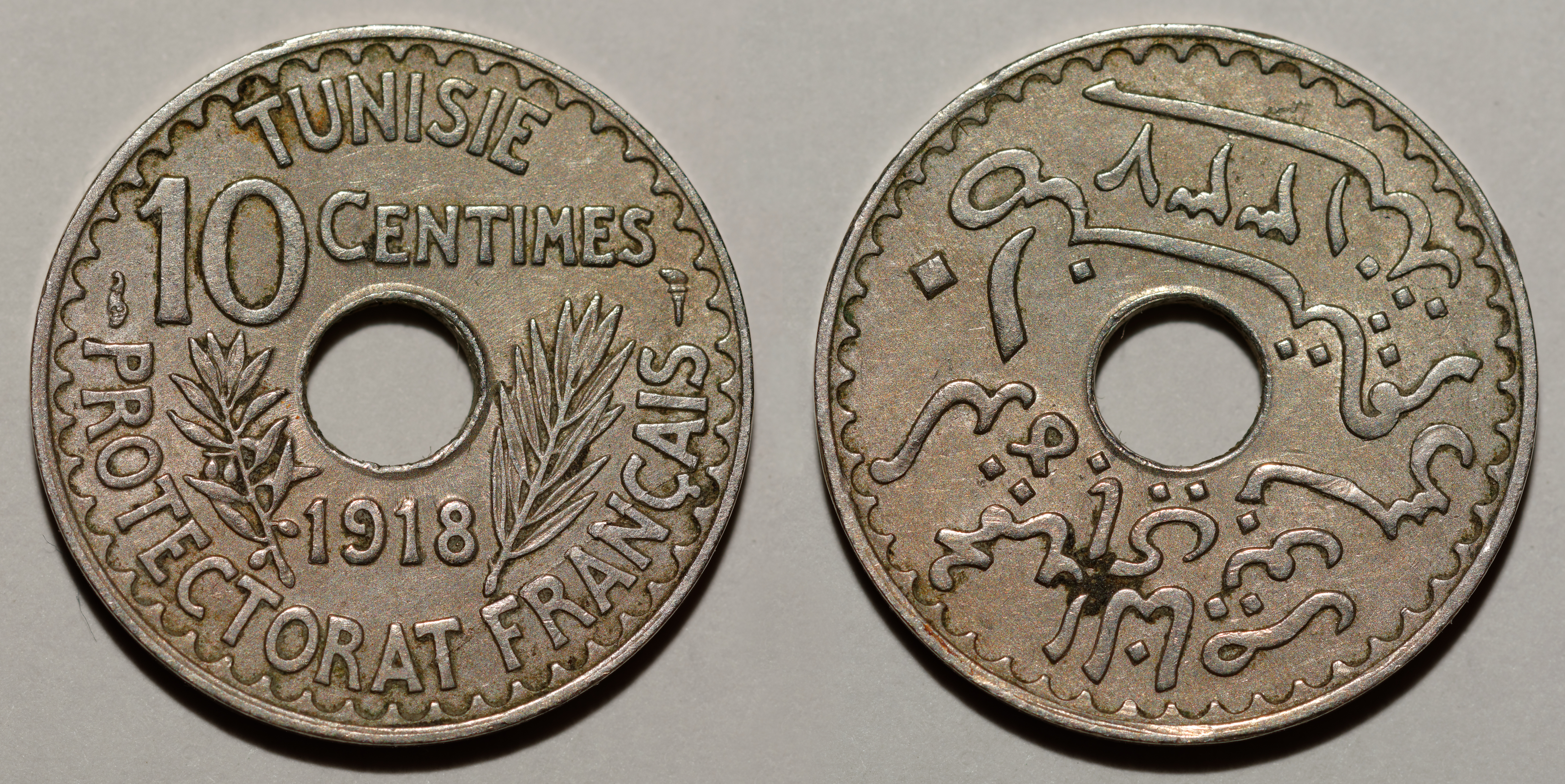 Pièce. Axe : indéterminé. Avers (à droite) : légende : inscription en arabe Revers (à gauche) : valeur faciale : 10 centimes millésime : 1918 différent : corne d'abondance ; graveur général : Henri-Auguste-Jules Patey (torche allumée) autre inscription : TUNISIE ; PROTECTORAT FRANÇAIS